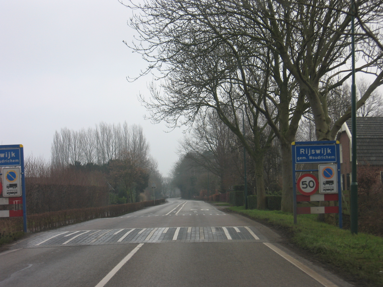 Rijswijk NB